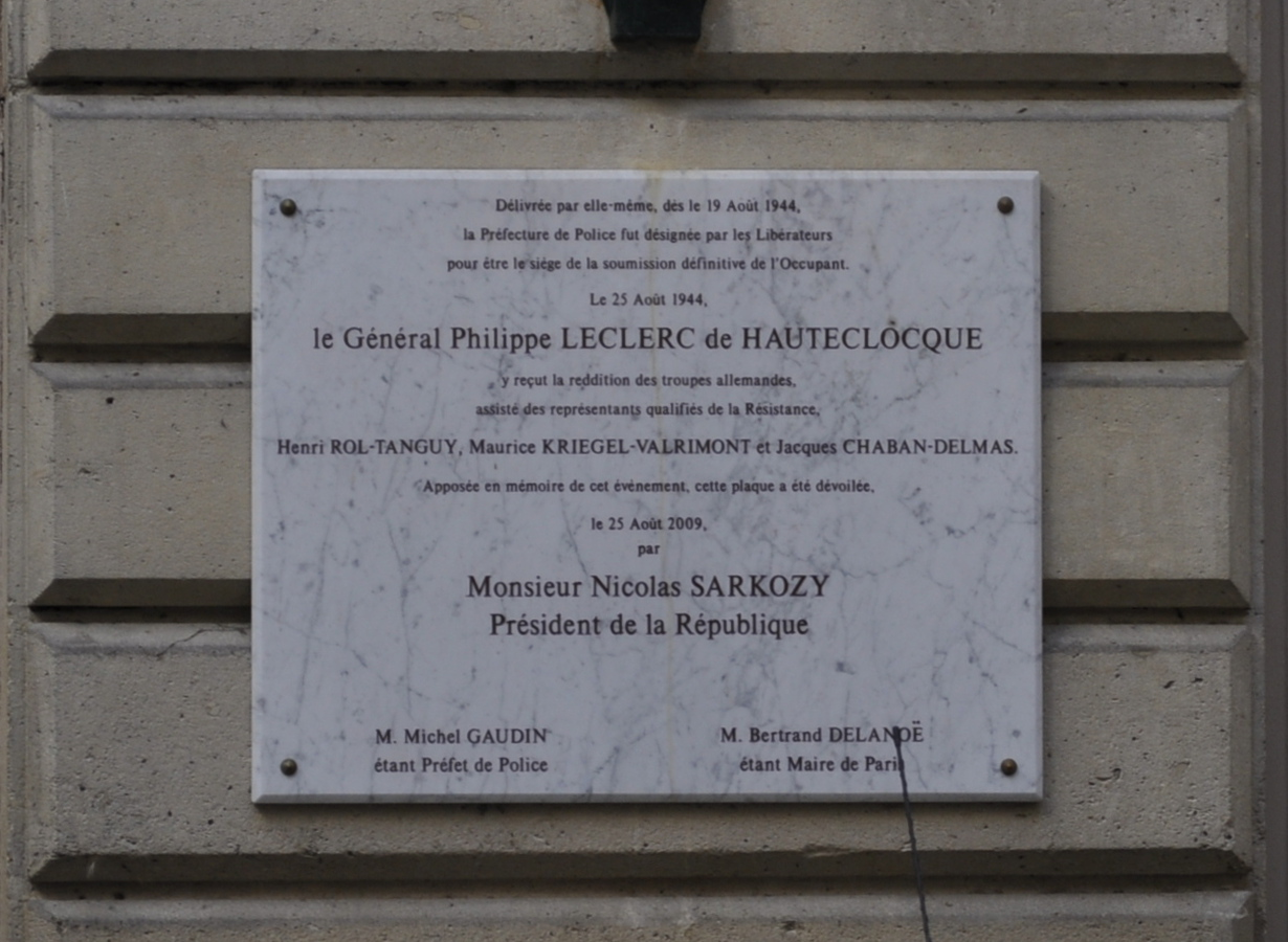 Plaque en mémoire de la réédition troupes allemandes apposée dans une cour de la préfecture de police de Paris. Photo prise lors des journées européennes du patrimoine 2015.